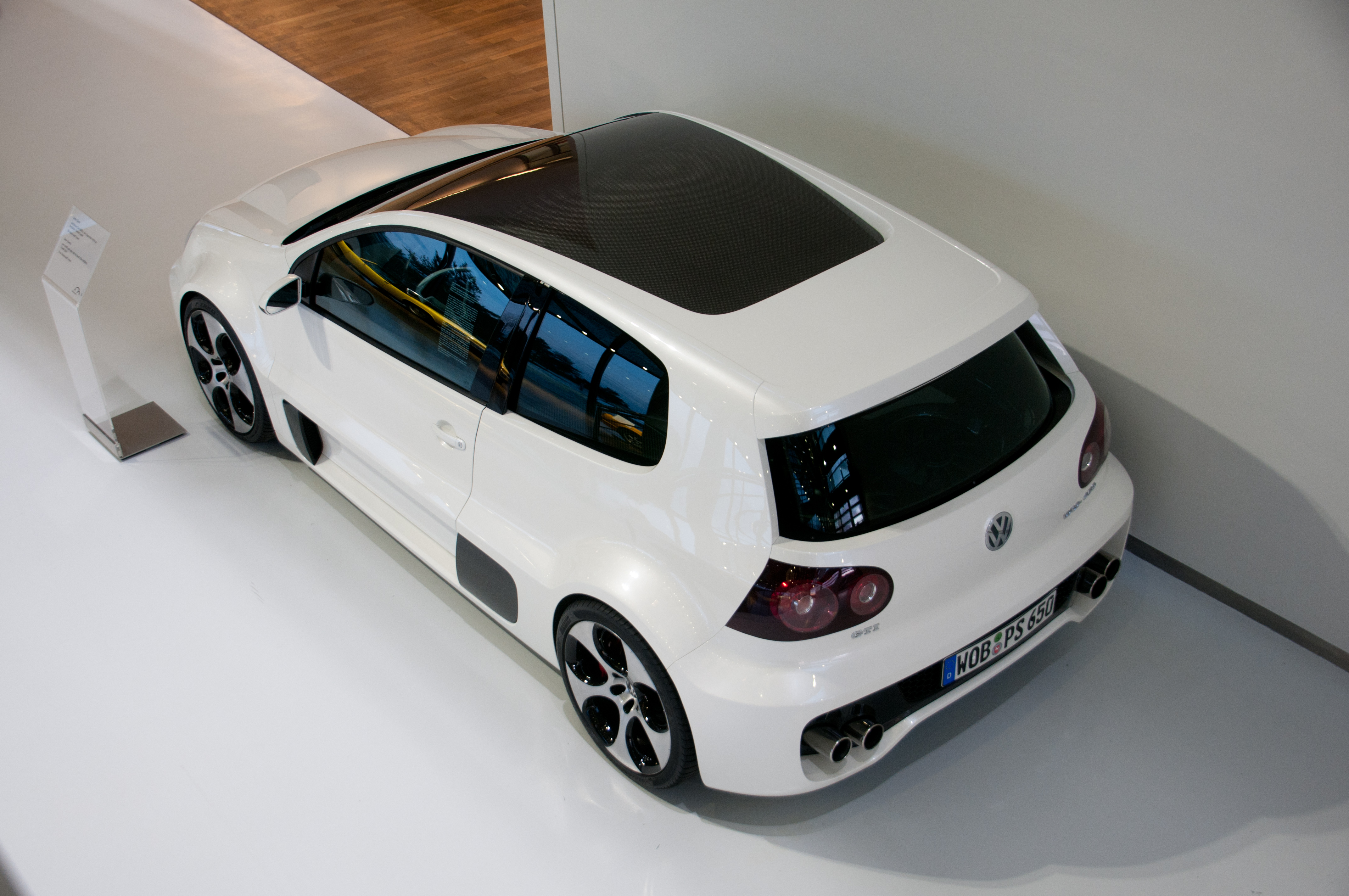 Autostadt Wolfsburg Golf GTI W12-650 mit 650 PS